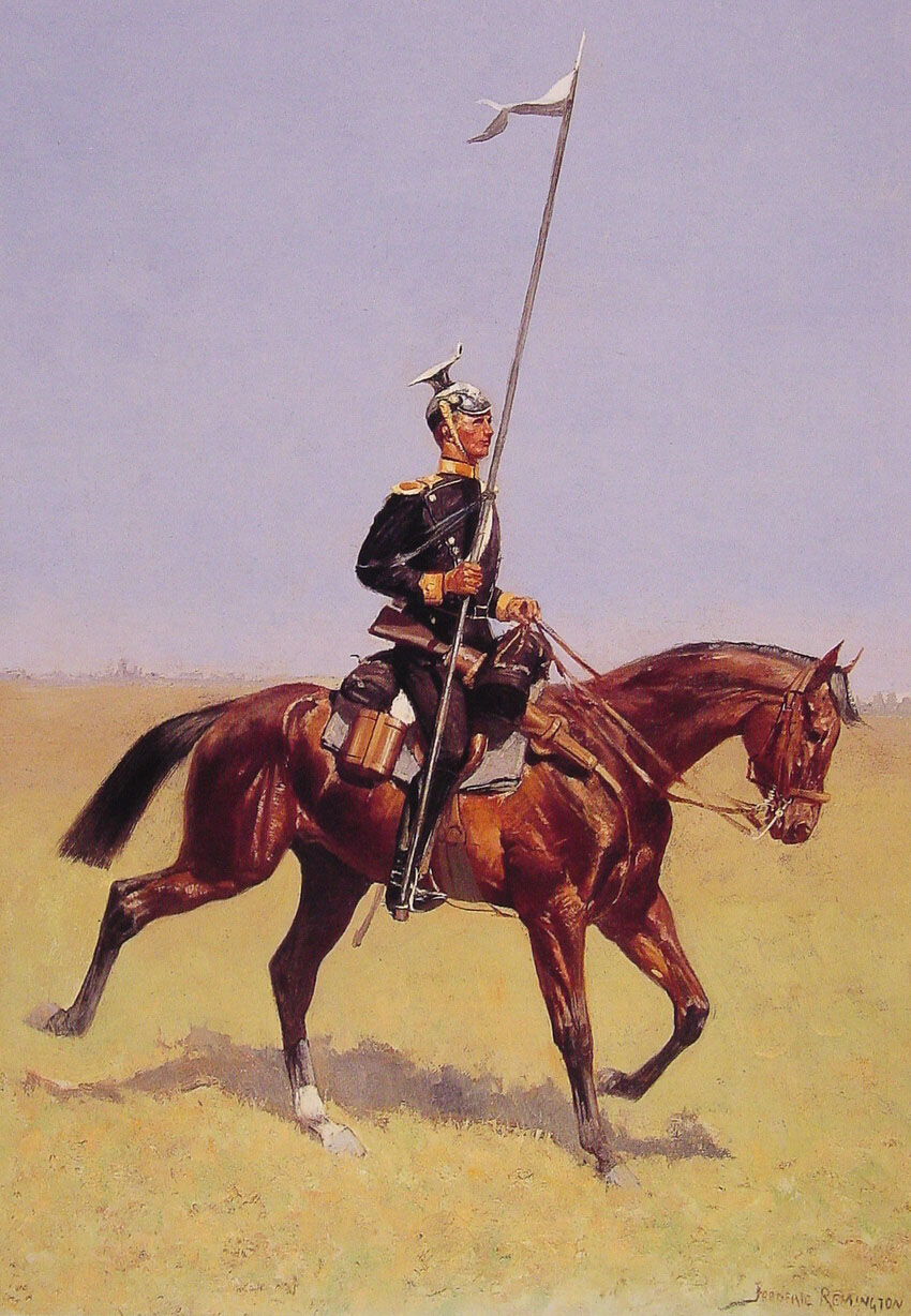 "Uhlan"